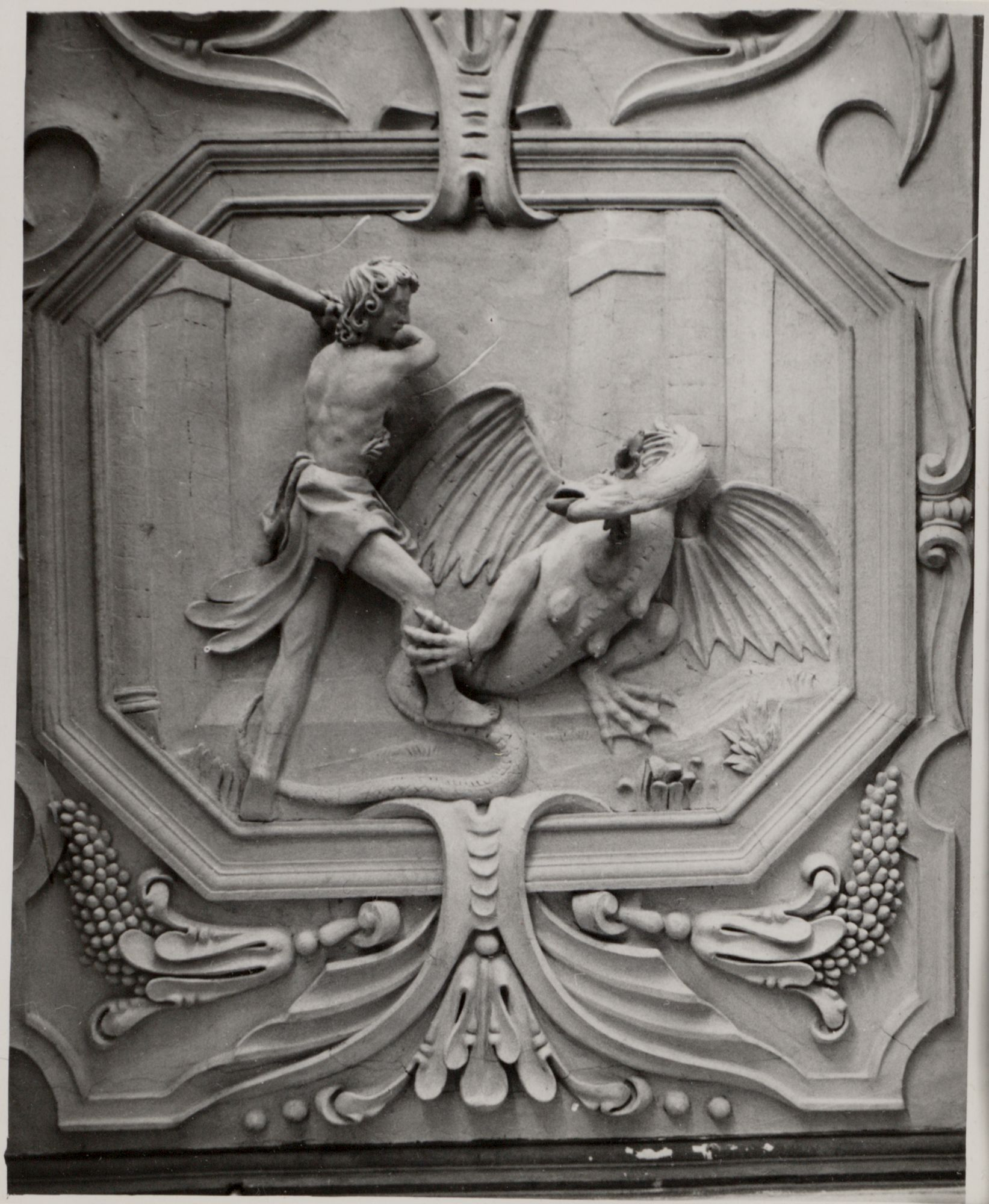 Plafonddecoratie in stucwerk in het voormalige ambachtshuis van de brouwers, Onderbergen 36-38 (hoek Zwartezustersstraat), Gent. Mythologische taferelen: de twaalf werken van Herakles (Hercules), hier: het doden van de Hydra van Lerna. Werk van beeldhouwer Jan Hansche, 1673.